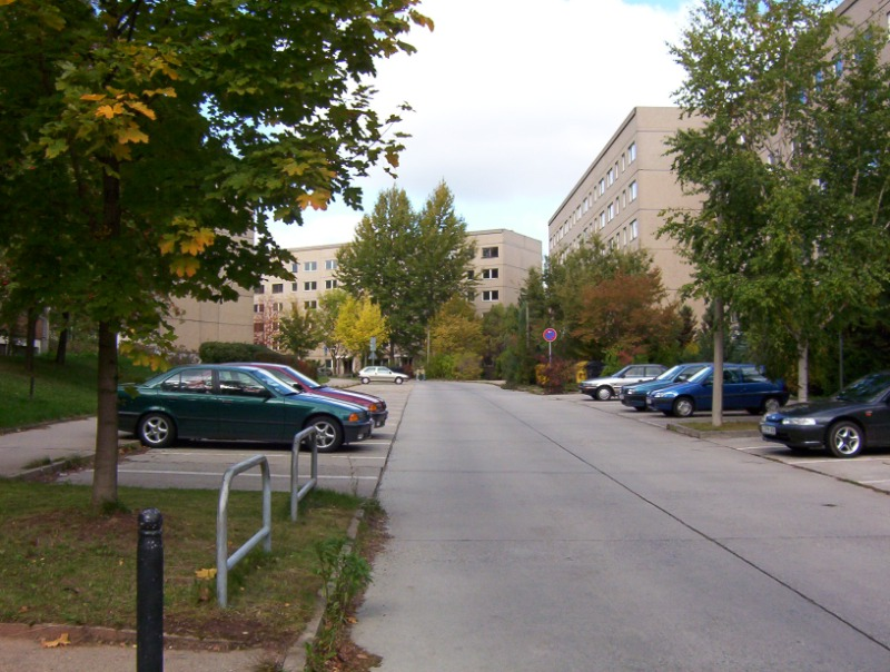 Straßenzug im sog. „Fritz-Heckert-Gebiet“ im Jahr 2003